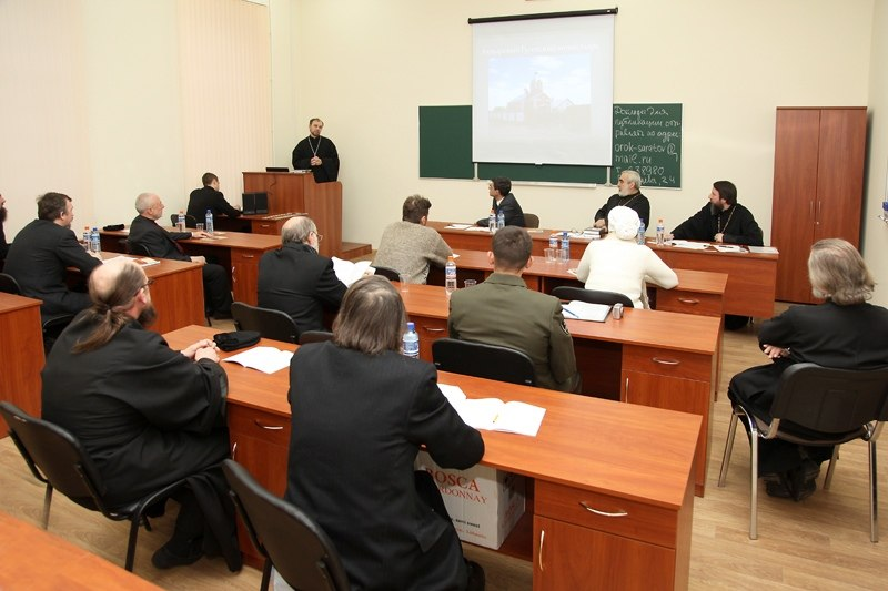 07 декабря 2013 года, заседание секции №2 "Духовное лидерство: традиции и инновации" (ул. Мичурина 92)